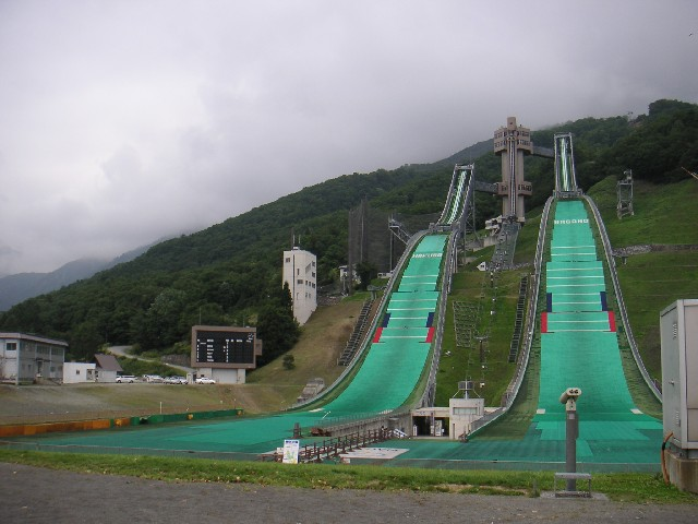 長野県北安曇郡白馬村 オリンピックジャンプ競技場 2005.09.23：投稿者自身による撮影